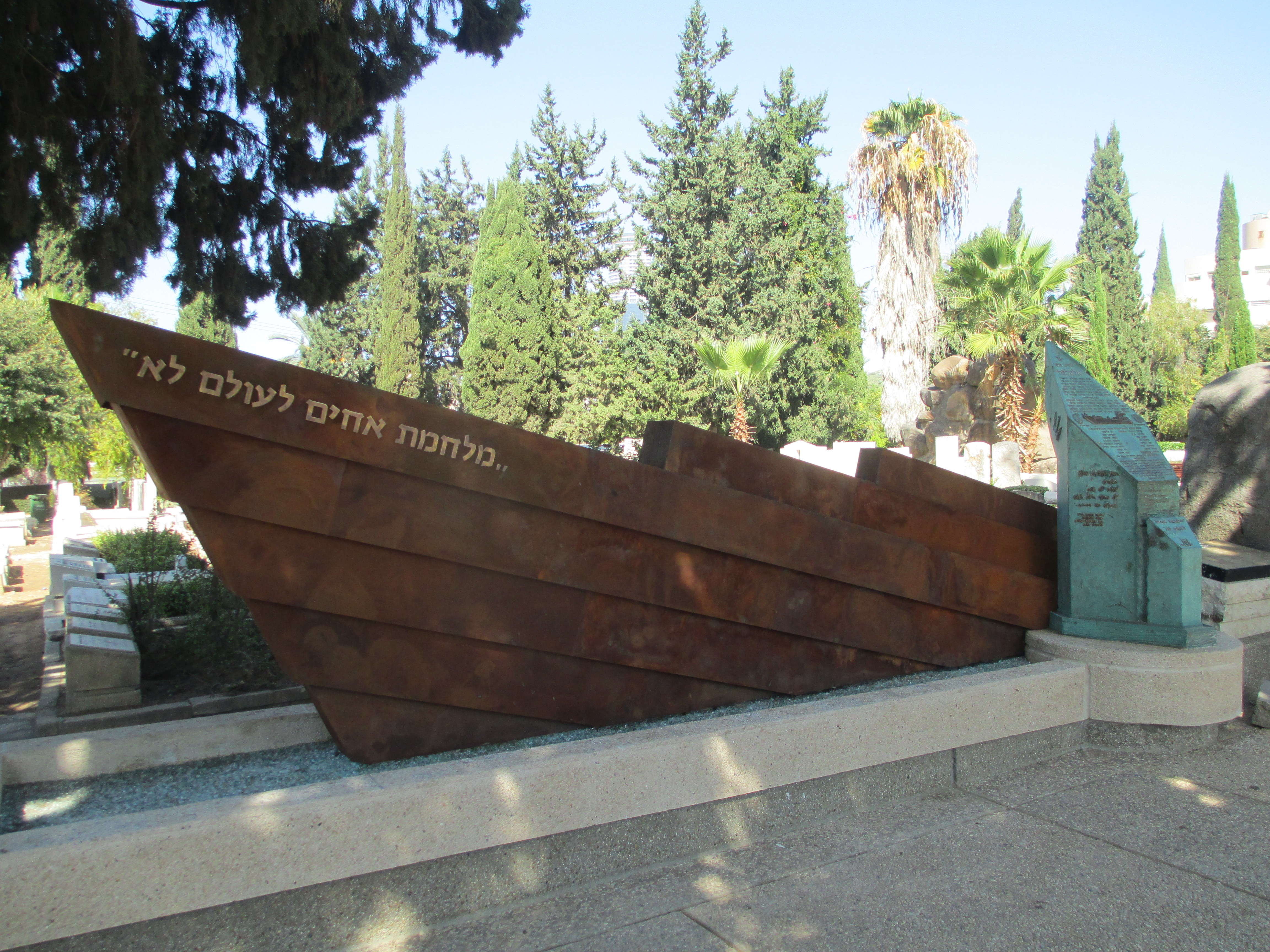 אנדרטת אלטלנה החדשה בבית הקברות נחלת יצחק